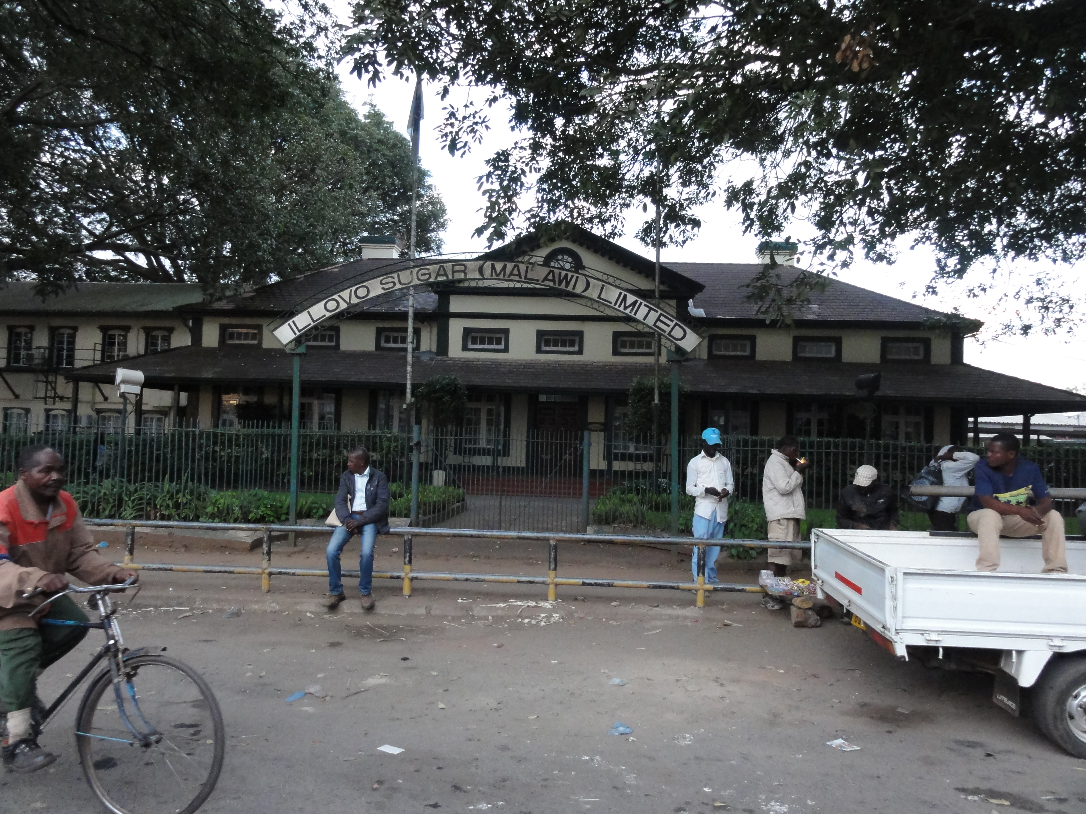 Ilovo Limbe